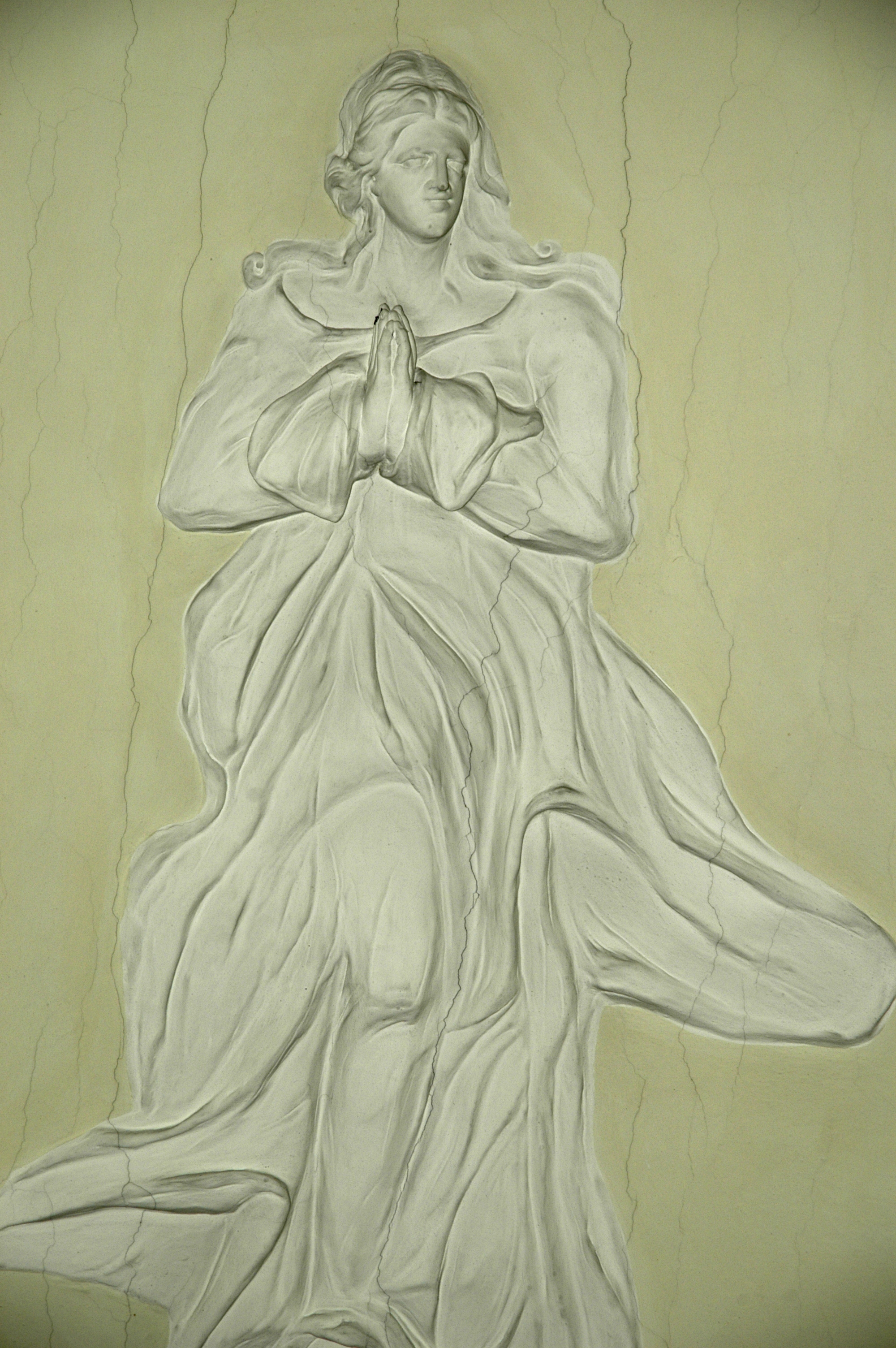 Stuckrelief Maria Immaculata auf dem Langhausgewölbe der katholischen Pfarrkirche Maria Magdalena in Unterdürnbach